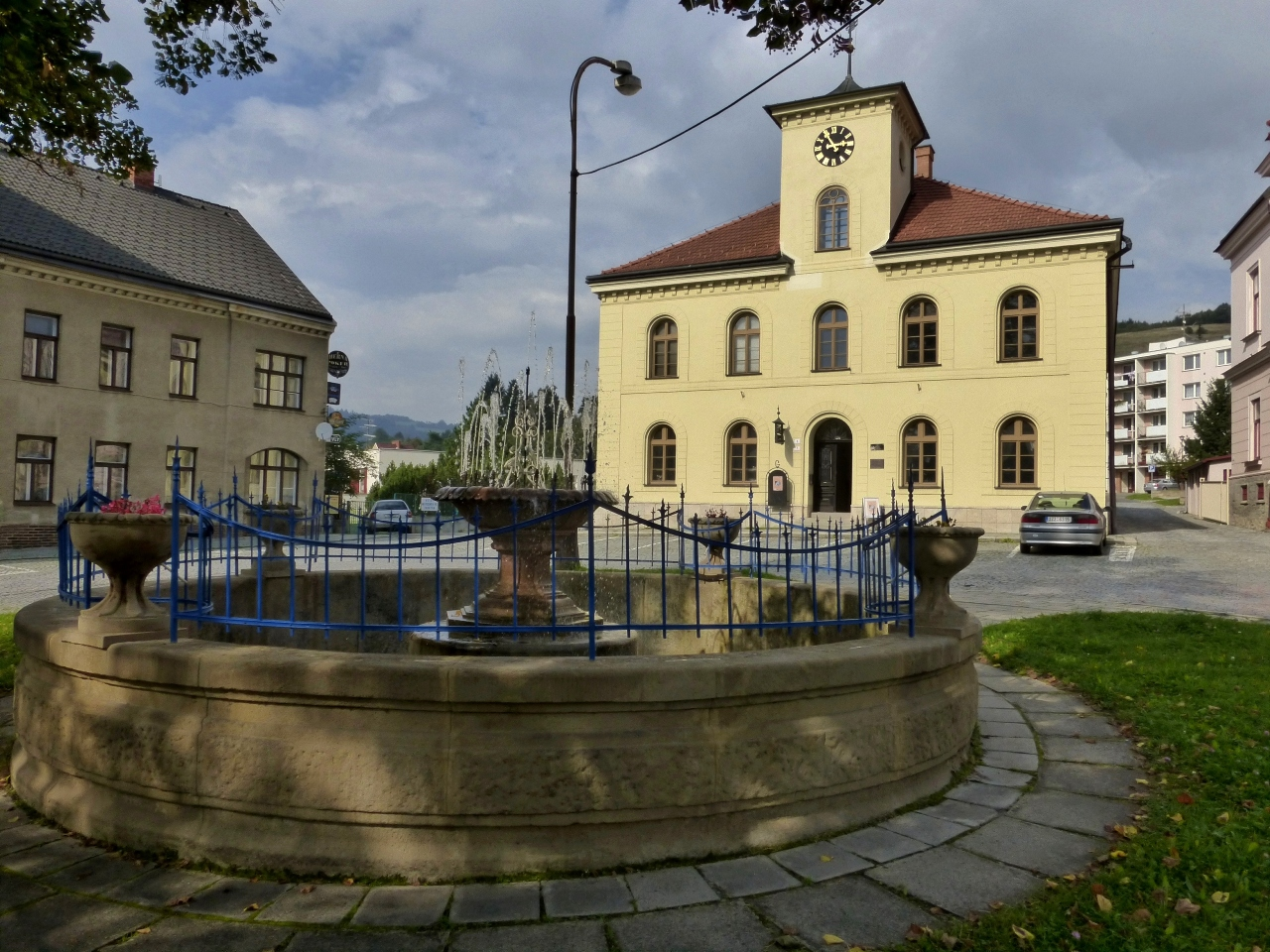 Kašna, Horní náměstí, Vsetín.